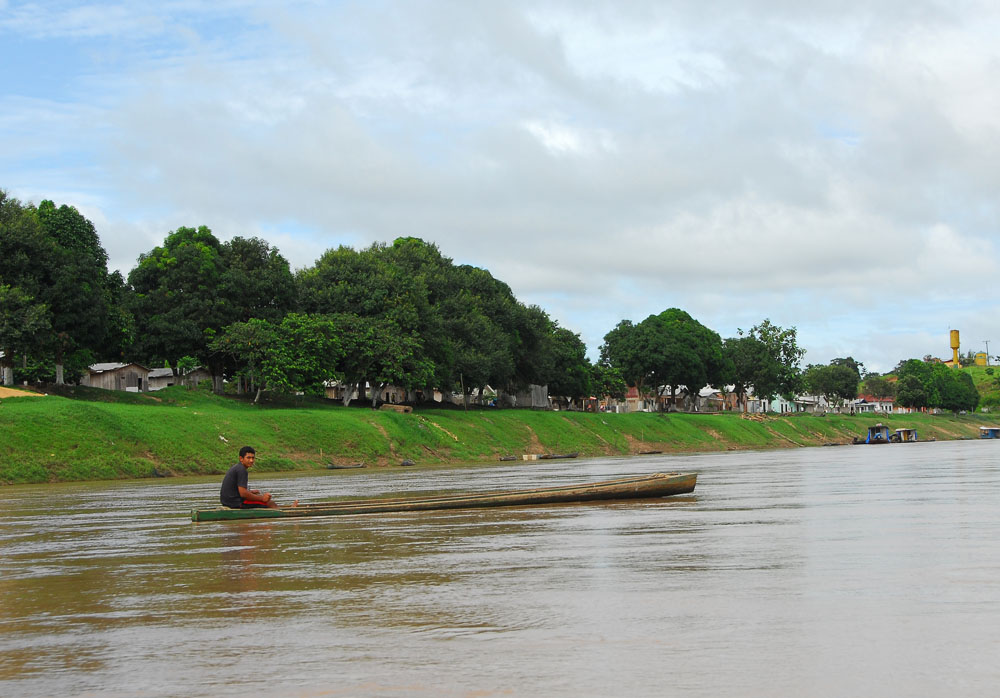 Santa Rosa do Purus - Acre. Saiba mais